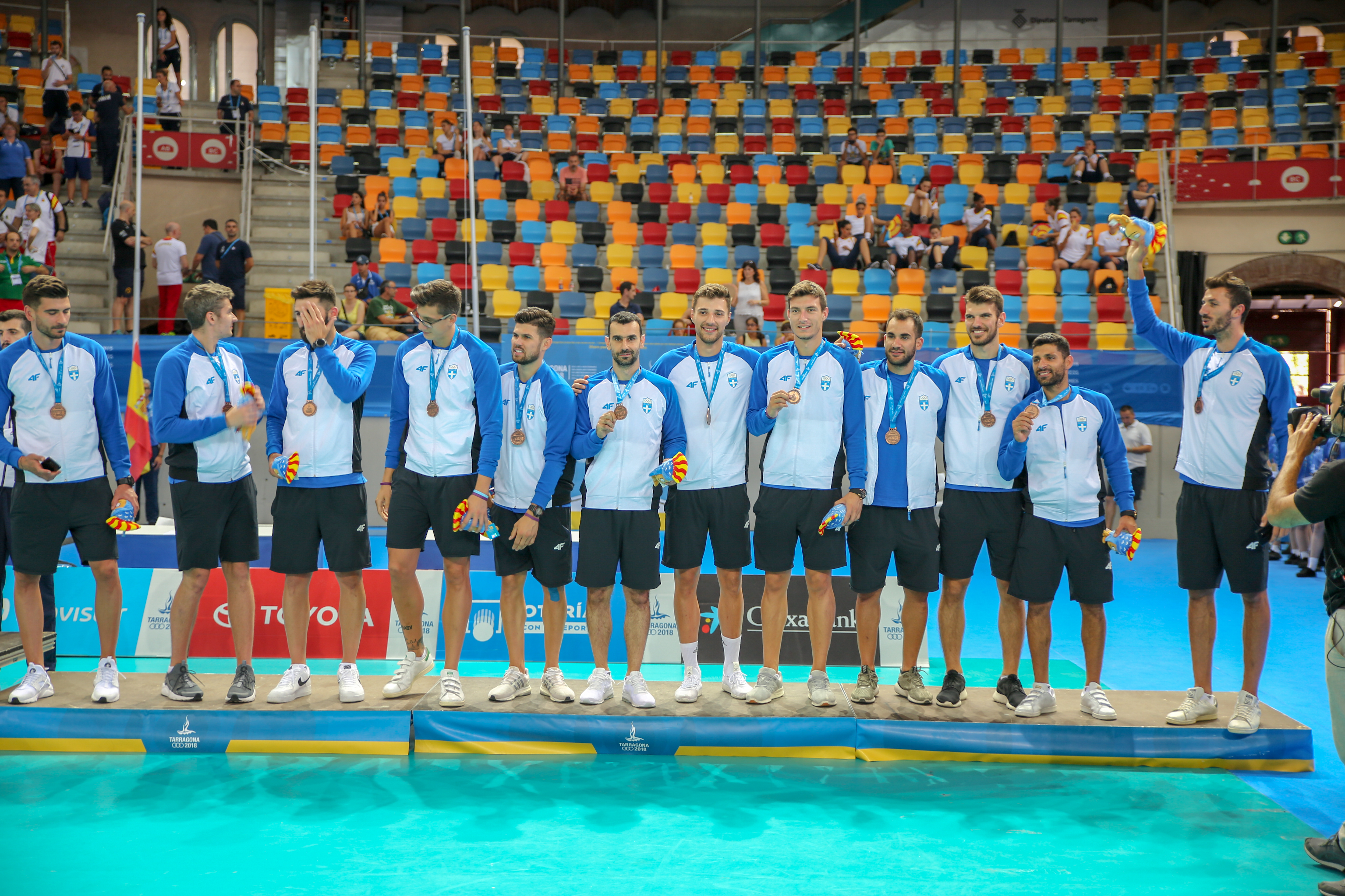 Grecia medallas - Juegos del Mediterráneo 2018